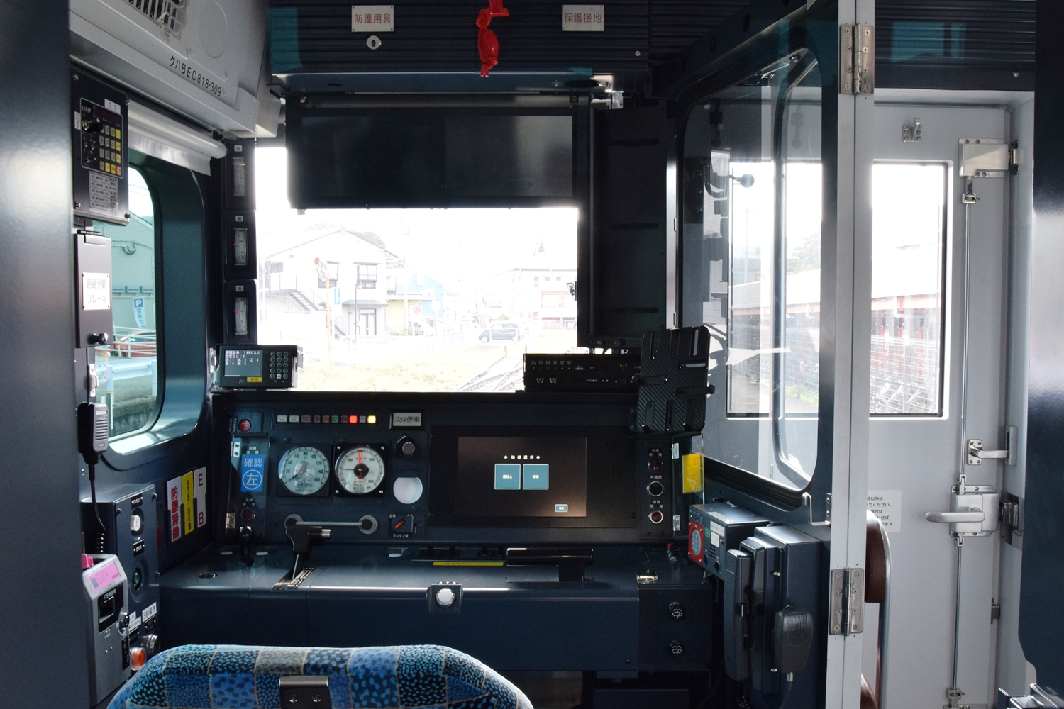 宇美にて撮影